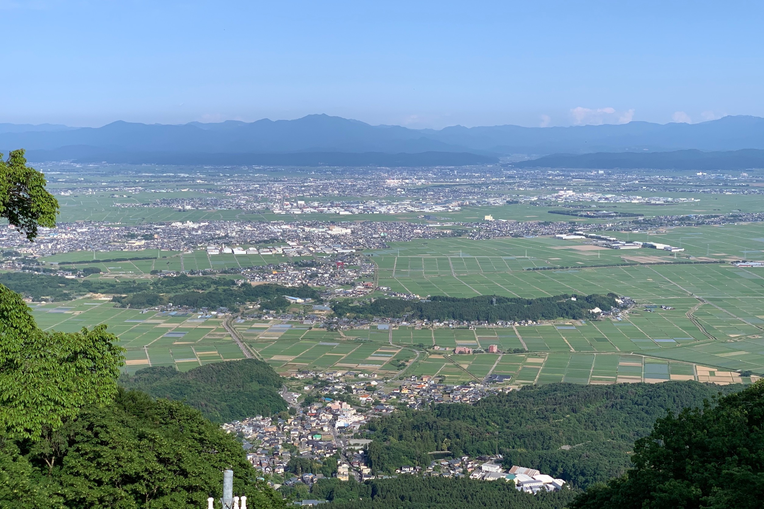 弥彦山9合目（弥彦山ロープウェイ山頂駅付近）から越後平野を望む（2020年6月）手前は弥彦村、奥は燕市の市街地